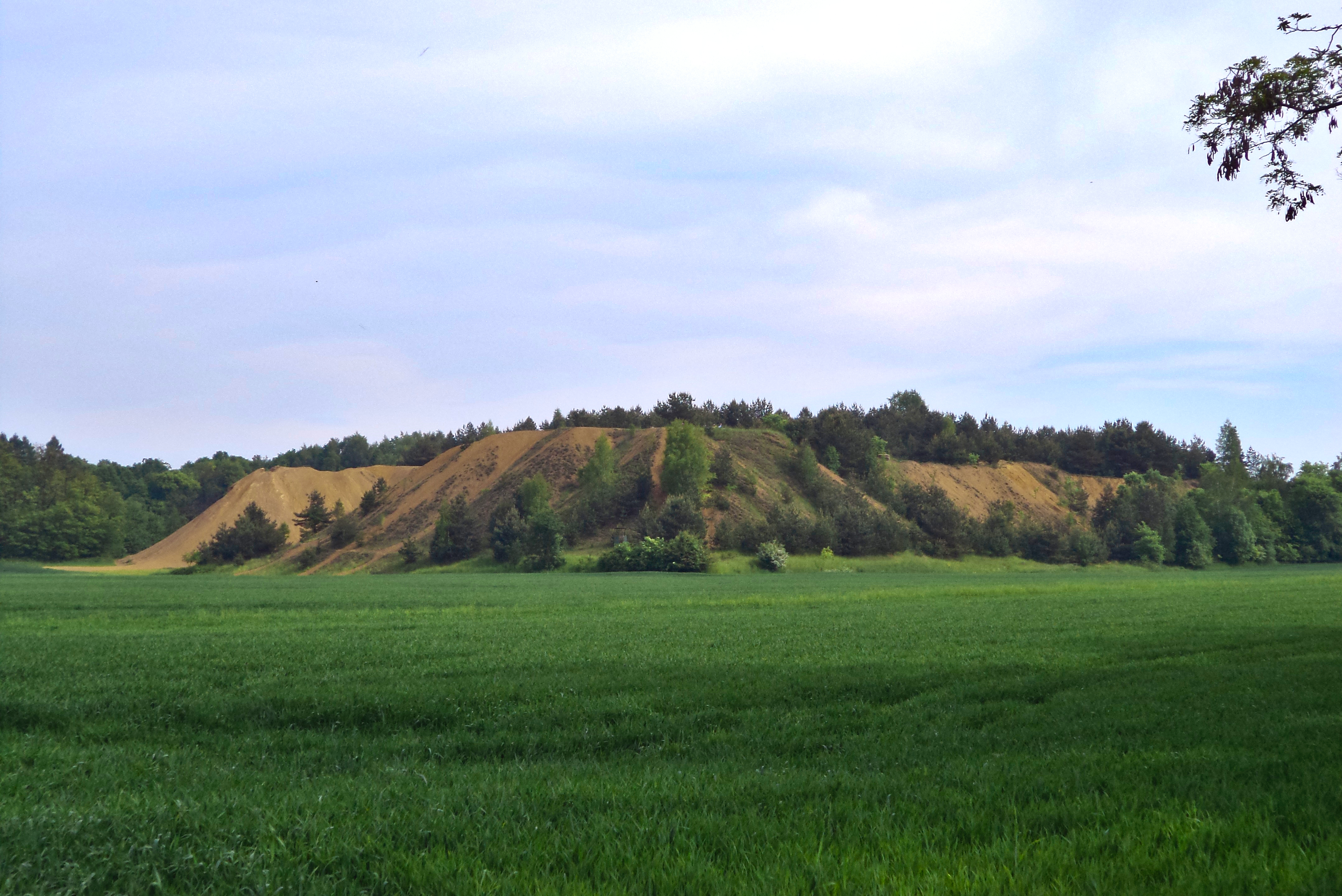 Hałda Popłuczkowa w Tarnowskich Górach